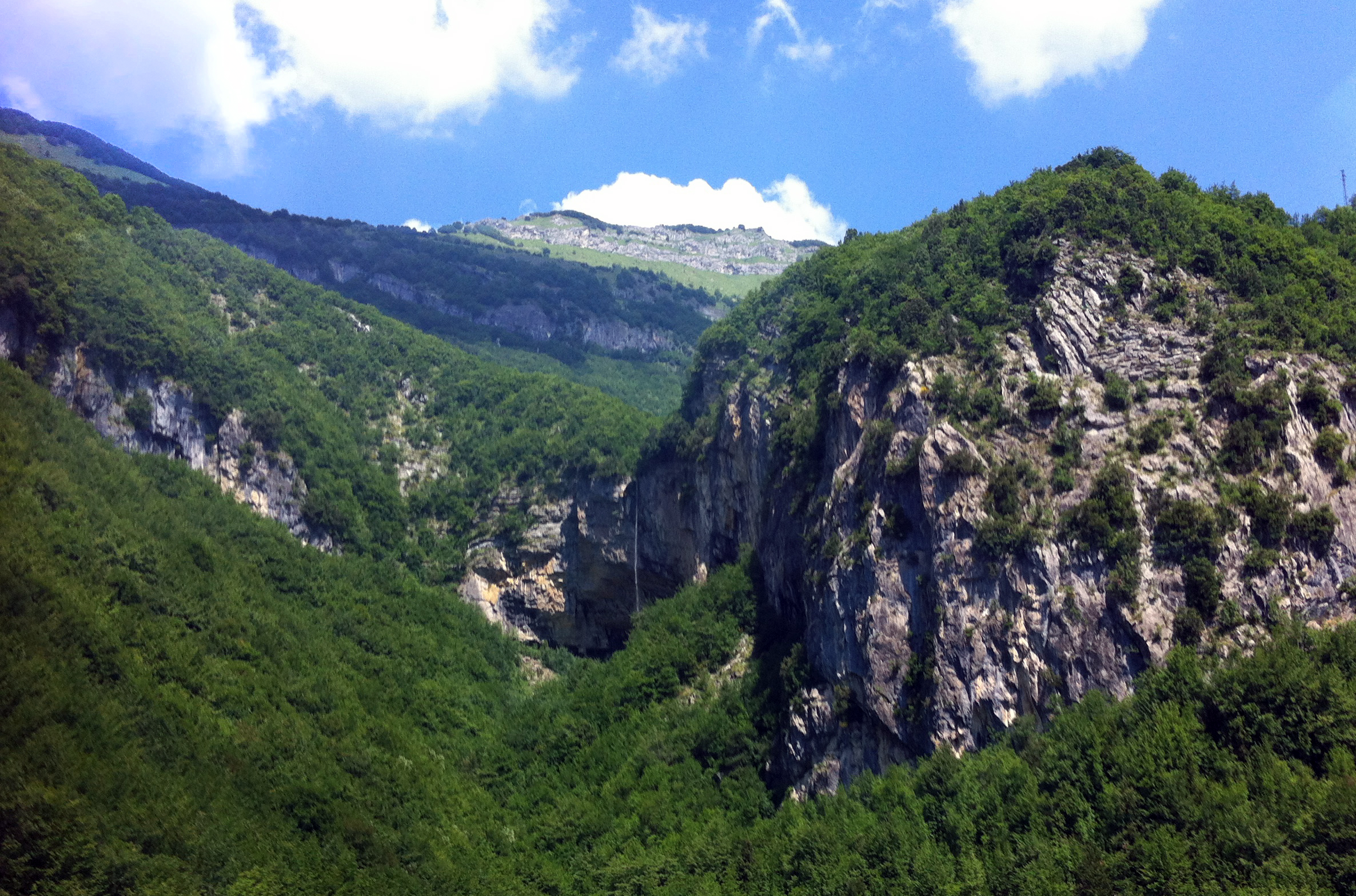 Cascata di Biselli, vista dal viadotto Biselli (A24), poco prima del traforo del Gran Sasso, venendo da Teramo